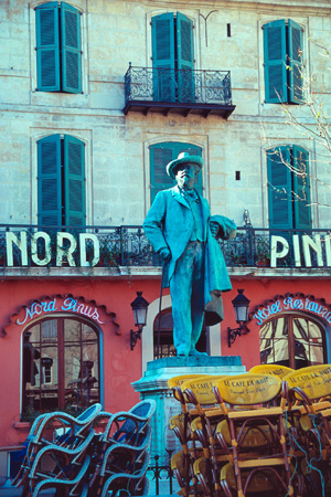 Frédéric Mistral, Occitan poet, Nobel laureate